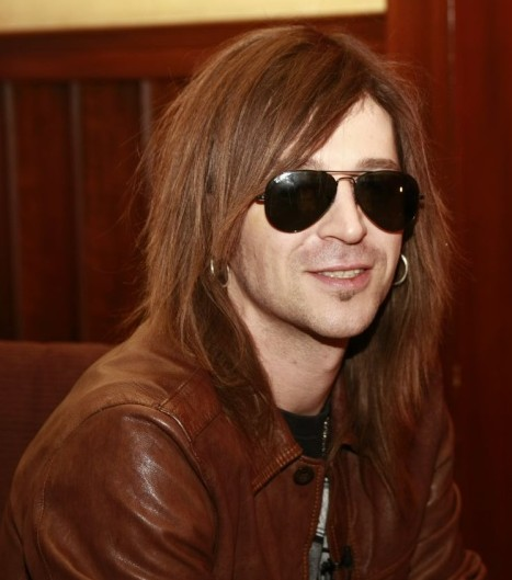 Steeve Estatof en Mai 2008 lors de la sortie du Poison Idéal